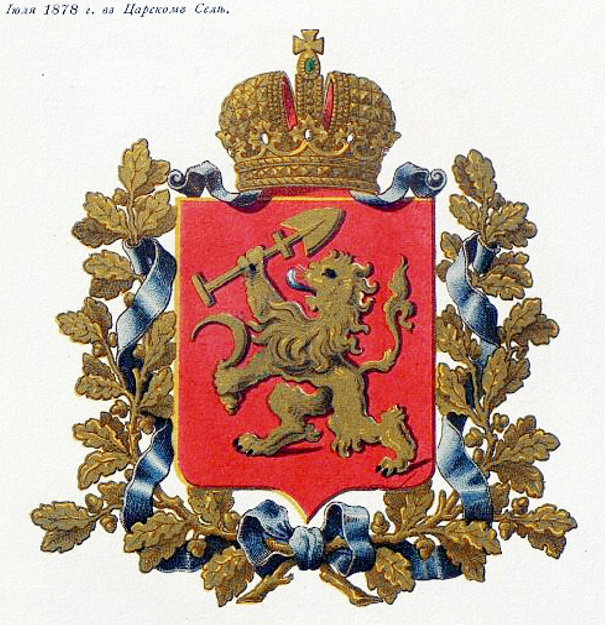 Official Russian Empire coat of arms Enisei Governorate. Герб Российской Империи Енисейской губернии в Гербовнике МВД. Утверждён Императором Всероссийским Александром Вторым.